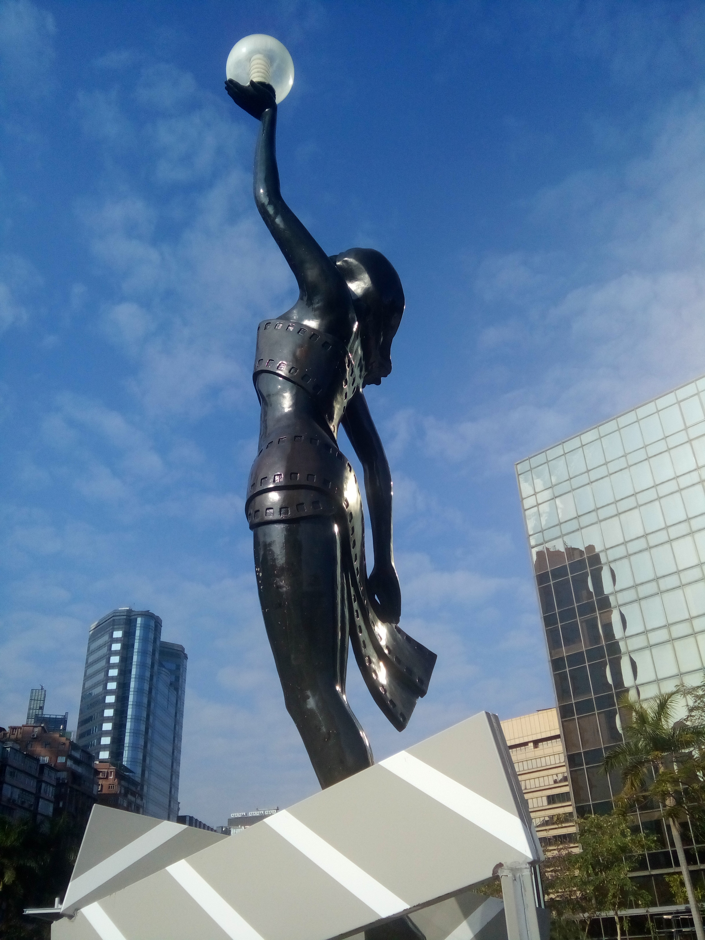 HK 尖沙咀東海濱平台花園 TST East Waterfront Podium 星光花園 Garden of Stars 香港電影金像獎座 in December 2016